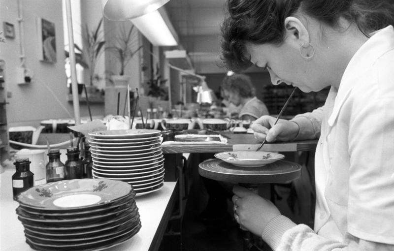 Weimar-Porzellan, Malerei ADN-ZB/Ludwig 3.1.89 Bez. Erfurt: Ansprechend in Form und Dekor sind die Erzeugnisse des VEB Weimar-Porzellan Blankenhain, wo im vergangenen Jahr ein umfangreiches Rekonstruktionsprogramm abgeschlossen wurde. Martina Rokosch gehört zum Kollektiv der Malerei. Der Blankenheimer Betrieb, dessen Erzeugnisse im In- und Ausland einen guten Namen haben, konnte seine Produktion seit 1980 mehr als verdoppeln.